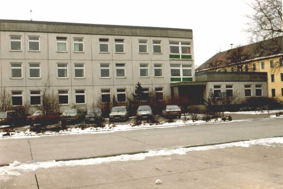 Ein Kompaniegebäude der Prinz-Leopold-Kaserne in Regensburg